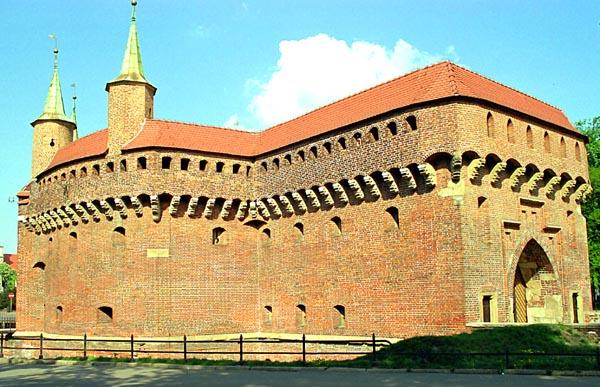 Krakow (Poland) Barbakan